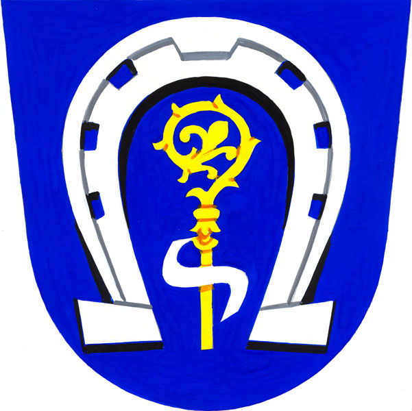 Znak obce Podmoklany